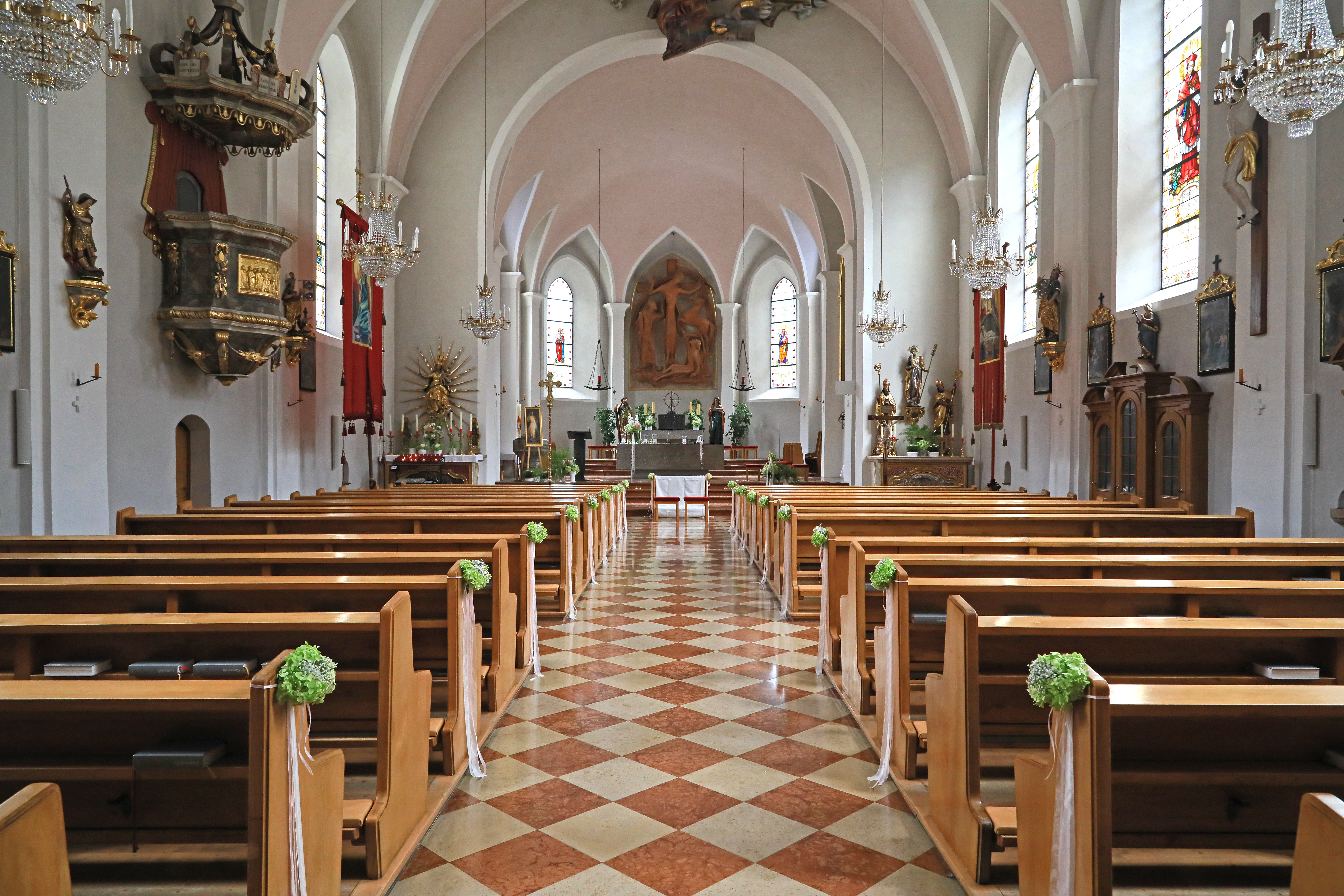 Der Innenraum der o.g. katholischen Kirche